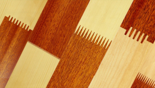 Unterschiedliche Keilzinkenprofile mit unterschiedlichen Holzarten